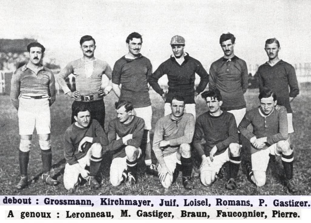 Le FC Levallois en décembre 1920.